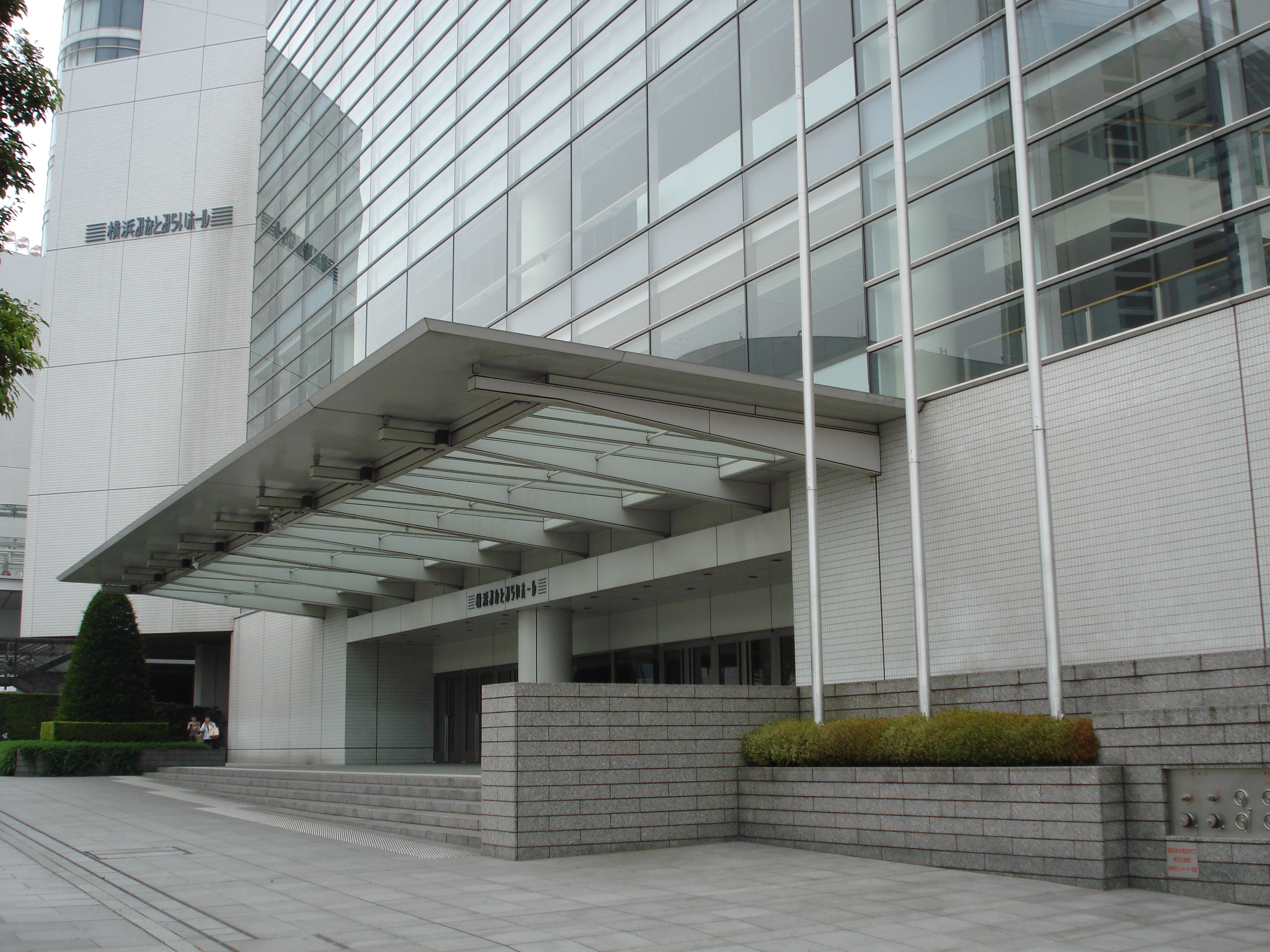 minatomirai hall